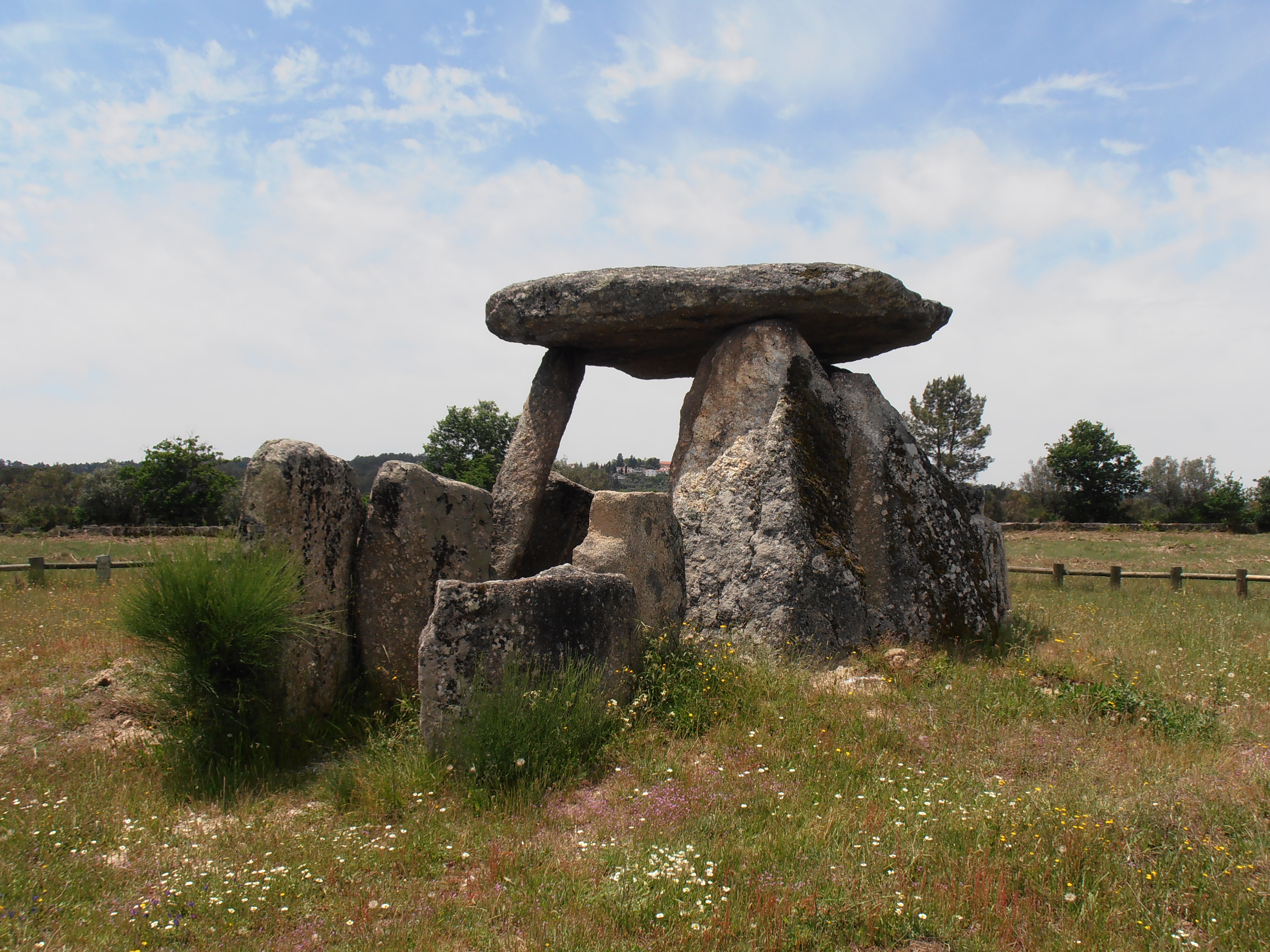 Dolmen Anta Rio Torto